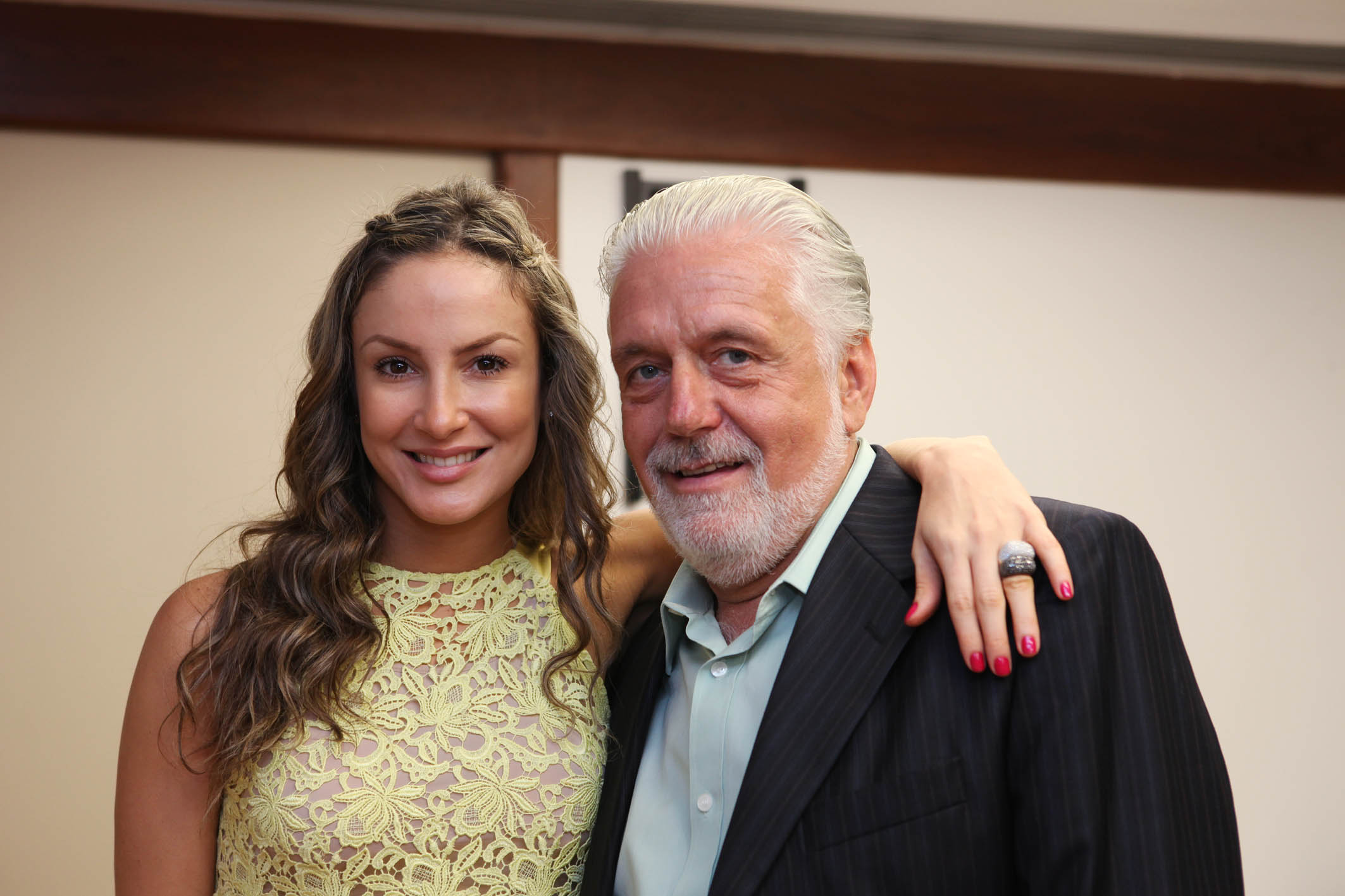 O governador Jaques Wagner e a cantora Claudia Leitte.